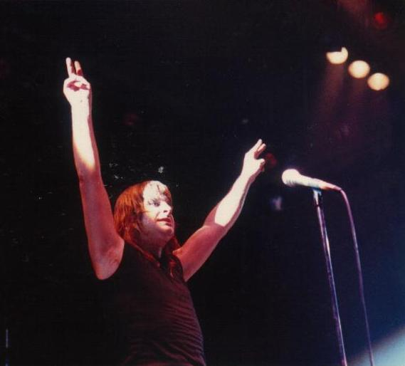 Ozzy Osbourne actuando en solitario en Cardiff en 1981.